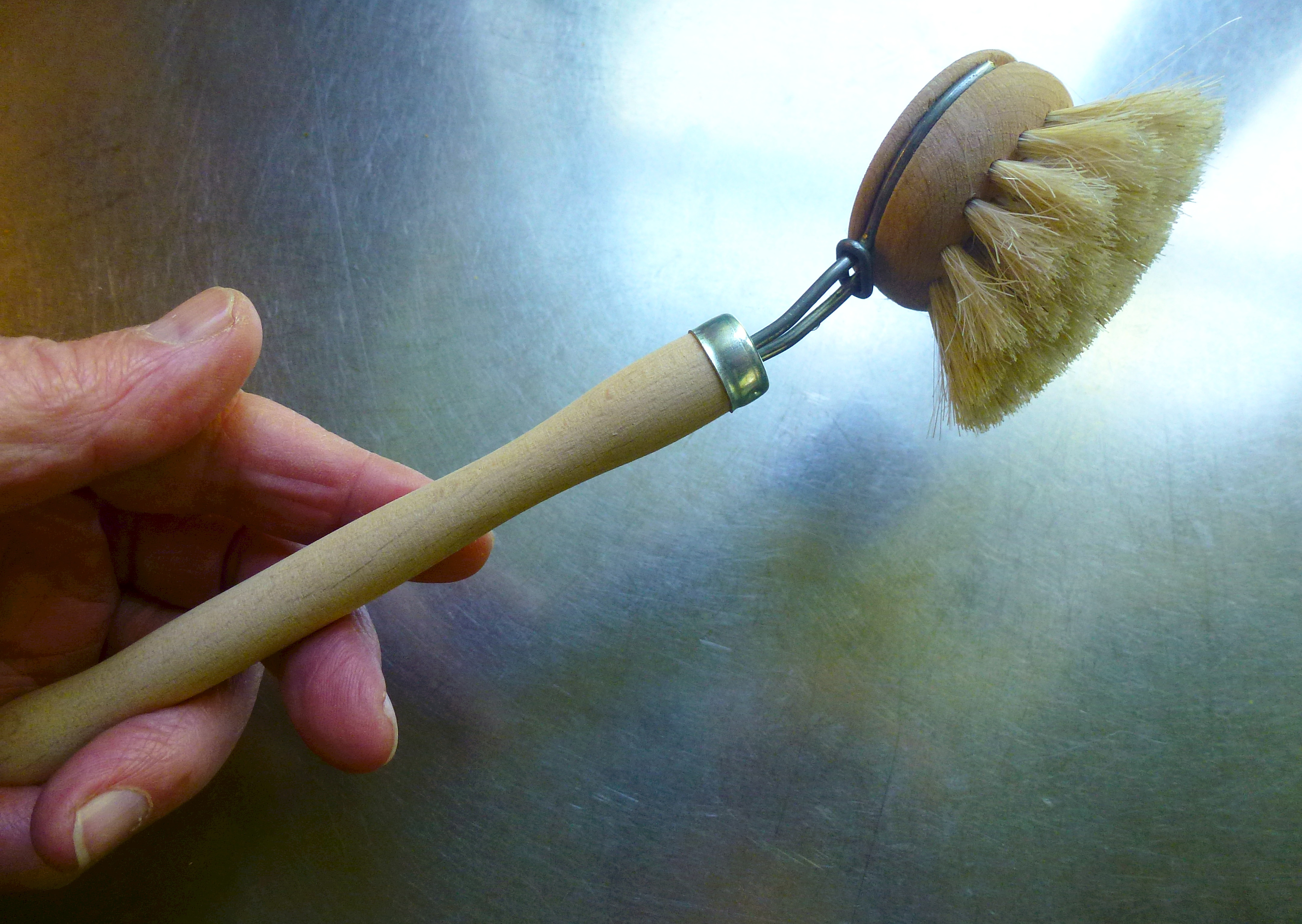 Diskborste av trä med bortsar av tagel